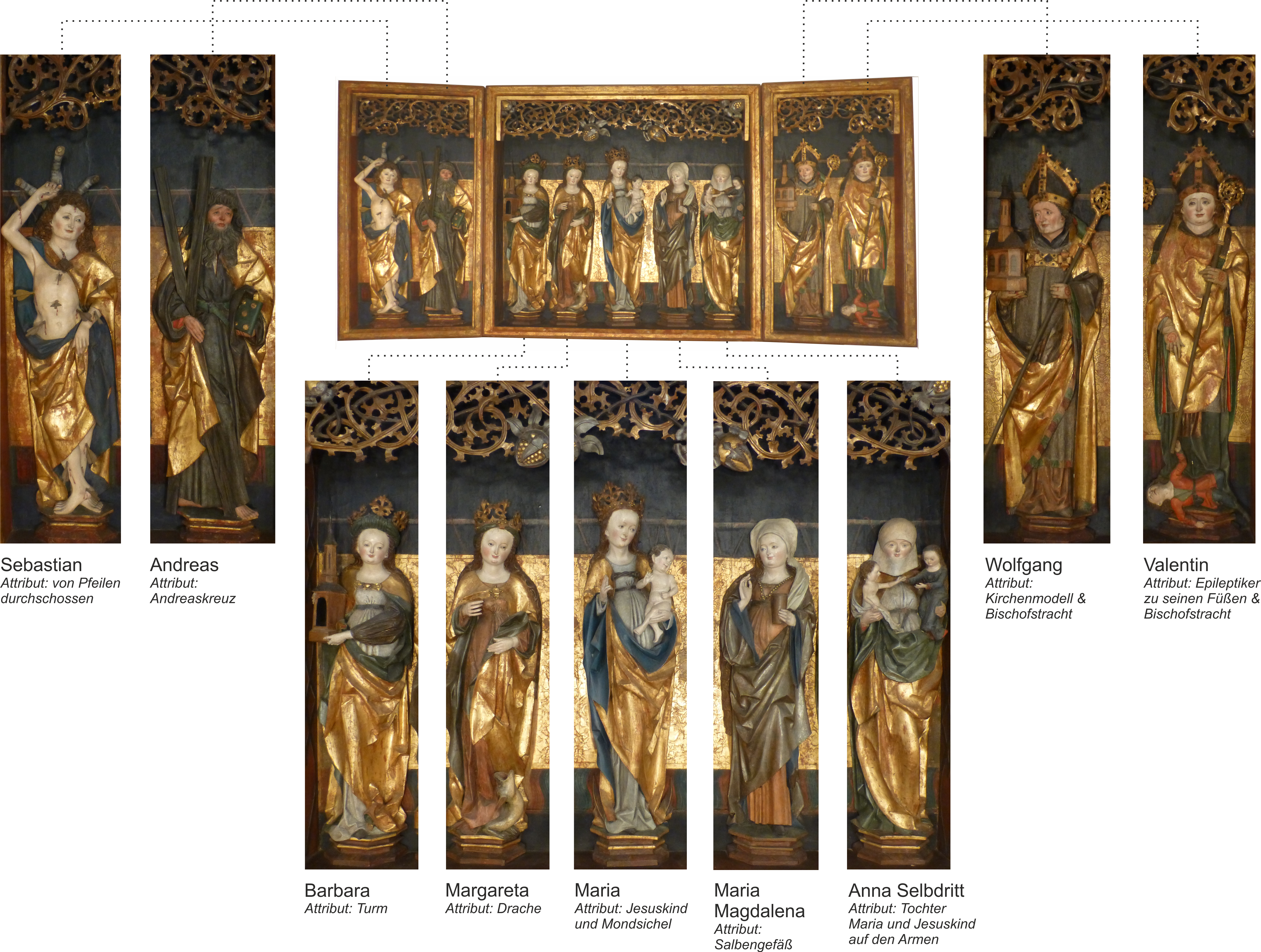 Übersicht der Schnitzfiguren auf der Festtagsseite des Tinzer Flügelaltars von 1497